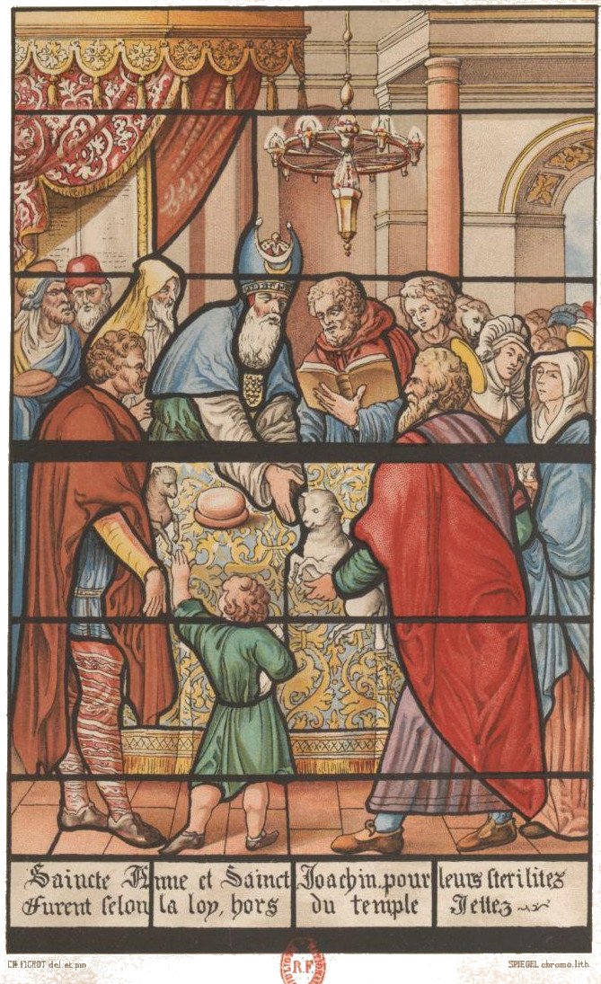 issu des collections des archives de l'Aube.